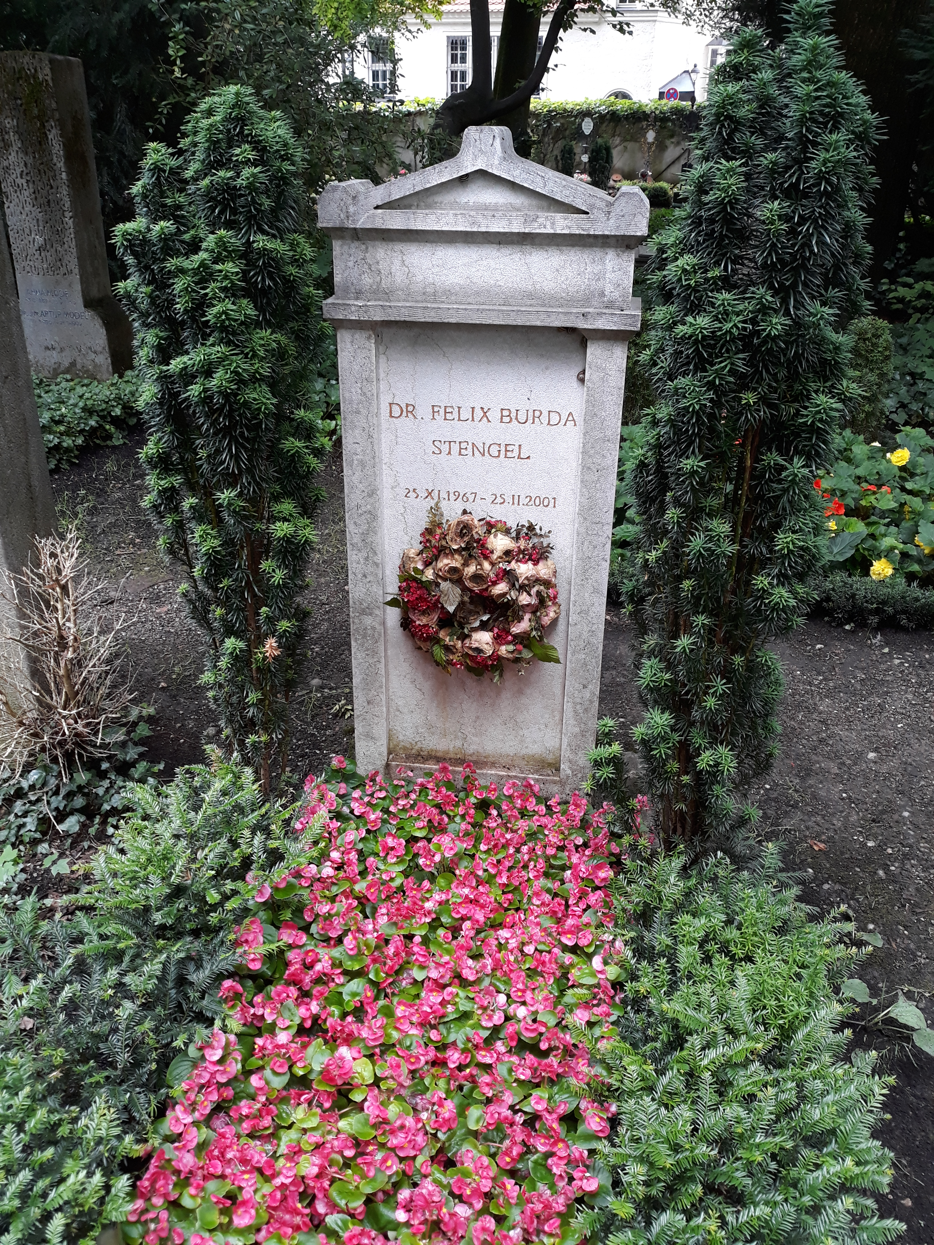 Das Grab des deutschen Kunsthistorikers Felix Burda-Stengel auf dem Bogenhausener Friedhof in München.